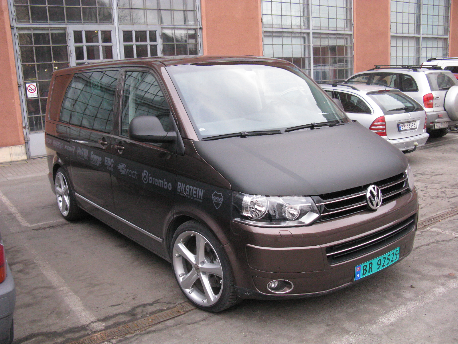 Volkswagen Transporter